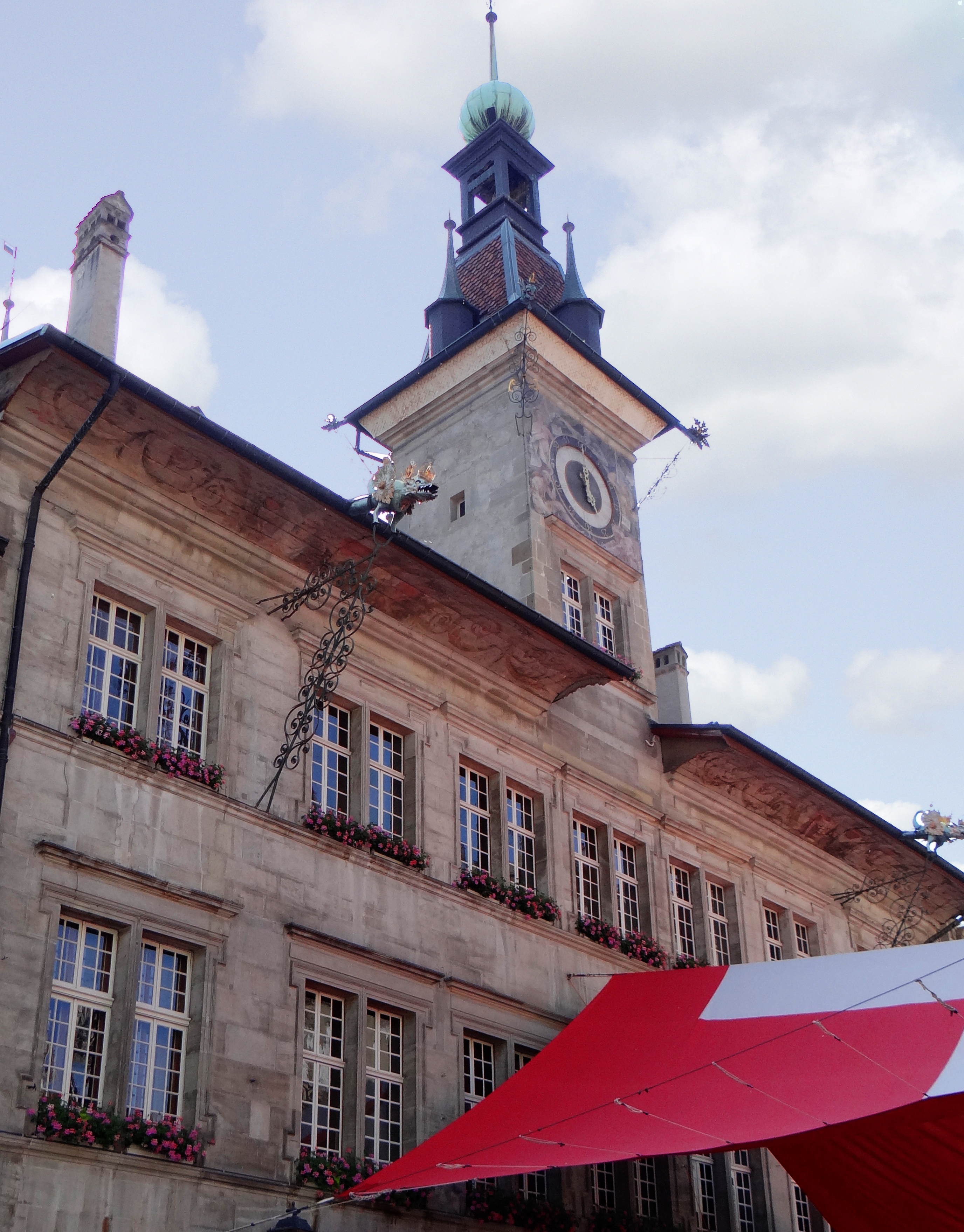 Rathaus